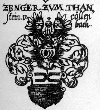 Wappendarstellung der Zenger